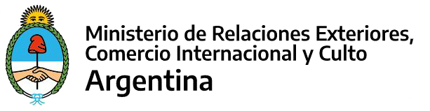 Ministerio de Exteriores 2019